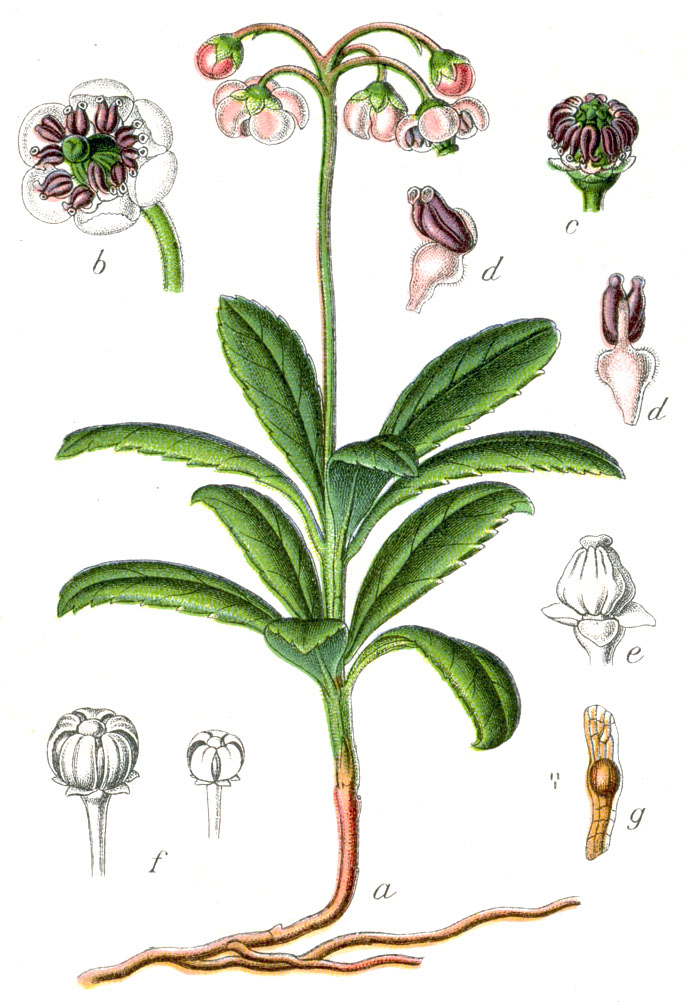 Chimaphila umbellata (L.) Barton, syn. Pyrola umbellata L. Original Caption Doldiges Wintergrün, Pirola umbellata